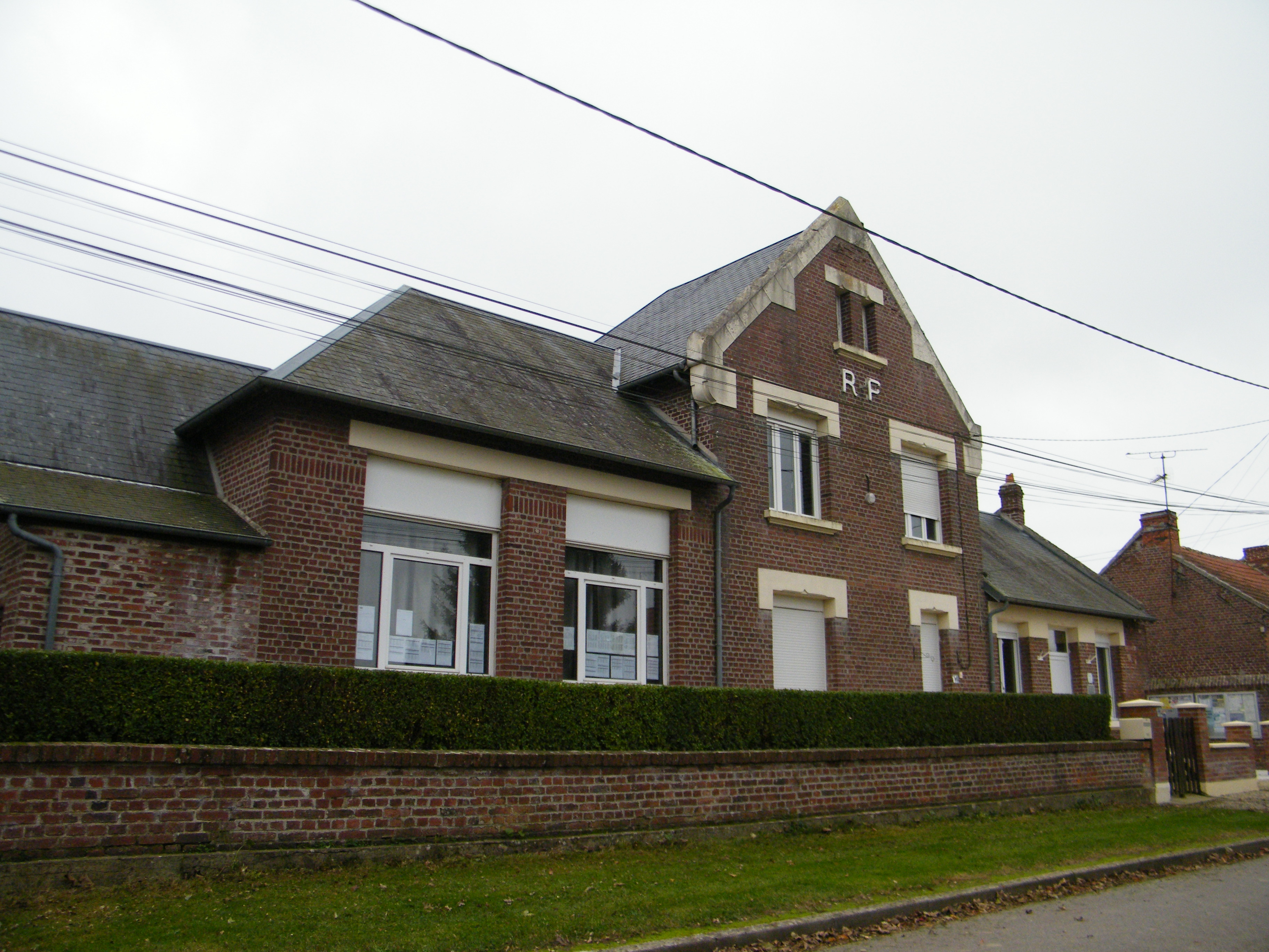 Bâtiments communaux.